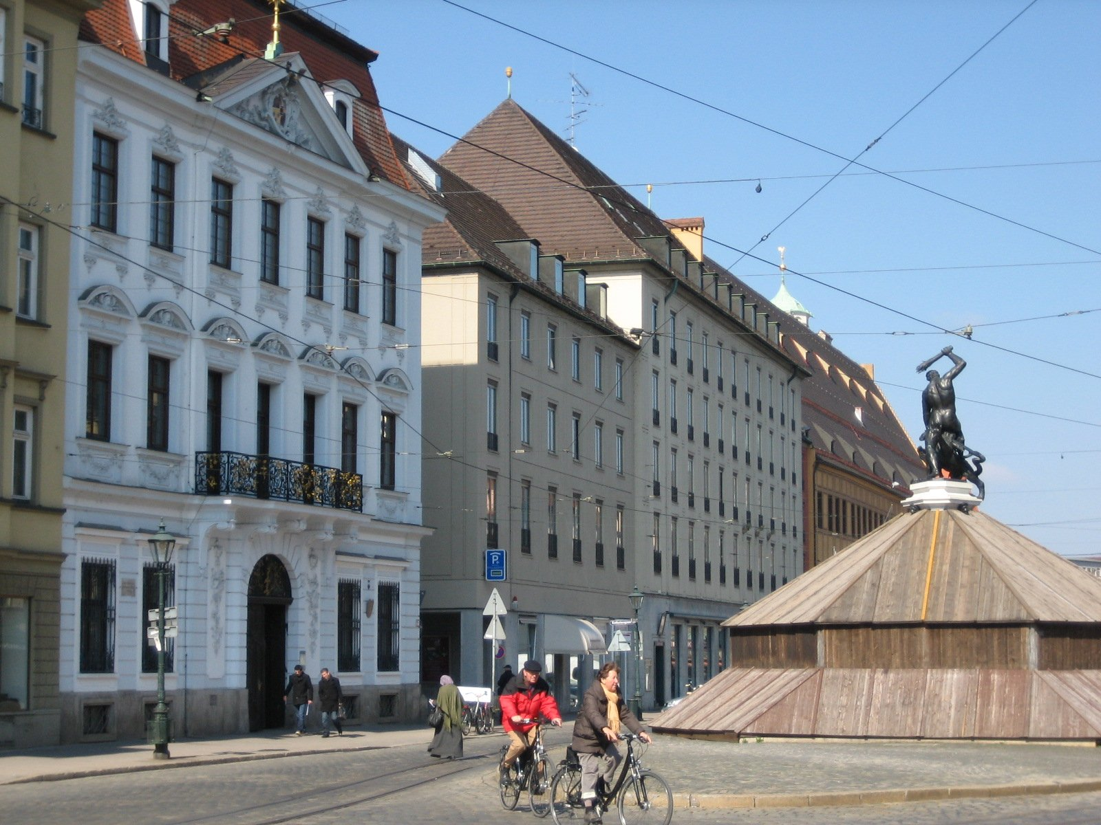 Hotel Drei Mohren in Augsburg; das Hotel hat links das Schaezlerpalais und rechts das Fuggerhaus zum Nachbarn. Der Herkulesbrunnen hat noch seine Winterabdeckung.